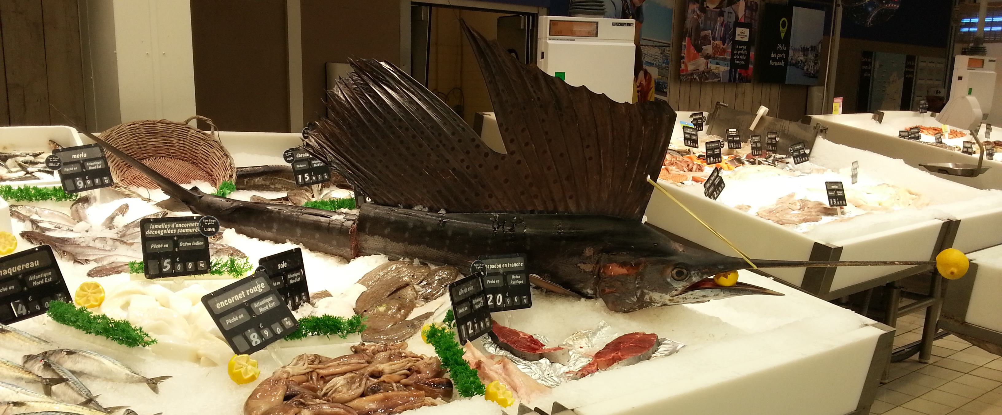 Un istiophorus entier est proposé à la découpe sur l'étal d'une poissonnerie dans un supermarché, sous l'appellation erronée "espadon".